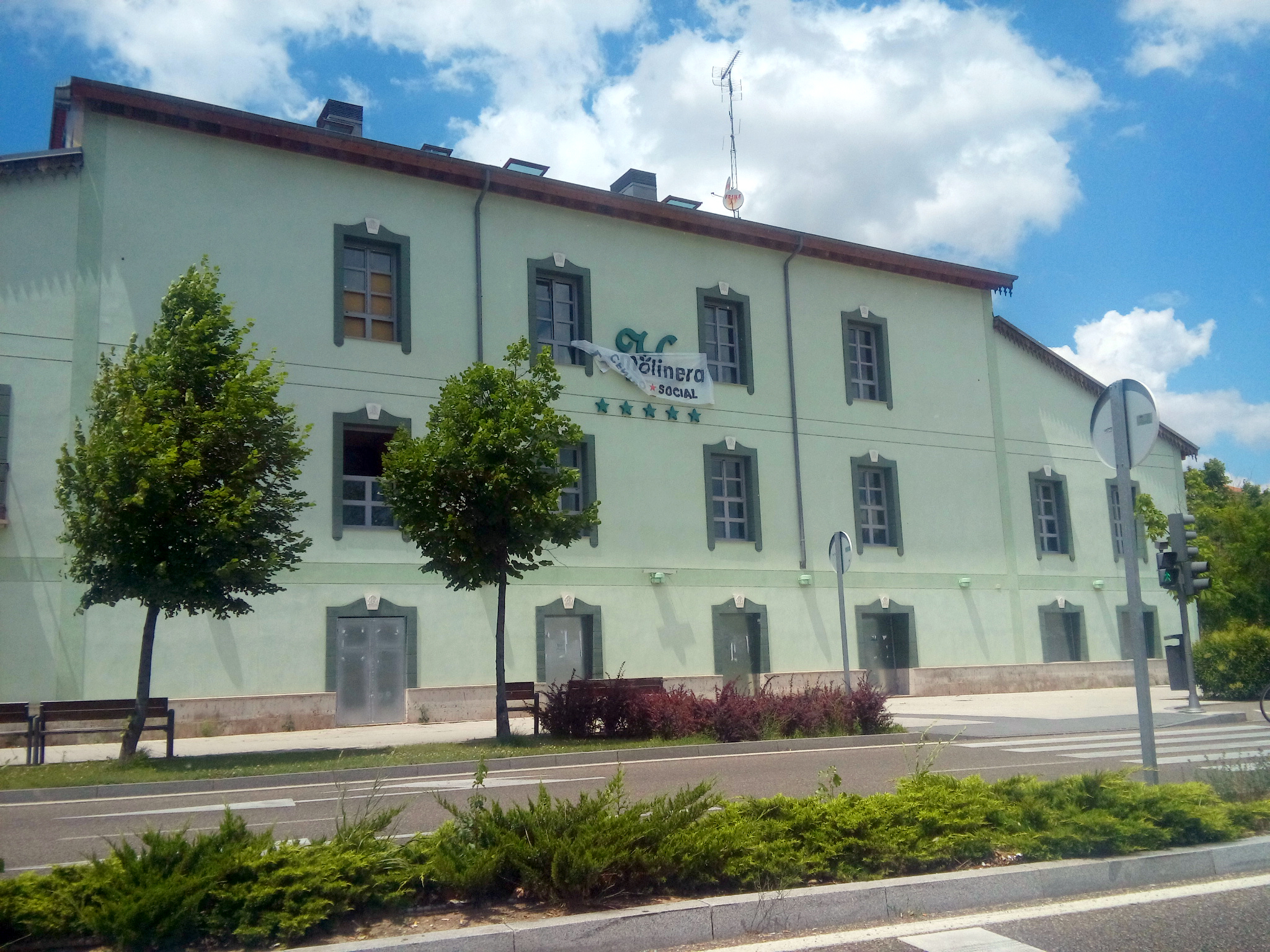 El antiguo Hotel Marqués de la Ensenada (ex Fábrica de harinas La Perla) reconvertido en Centro Social.